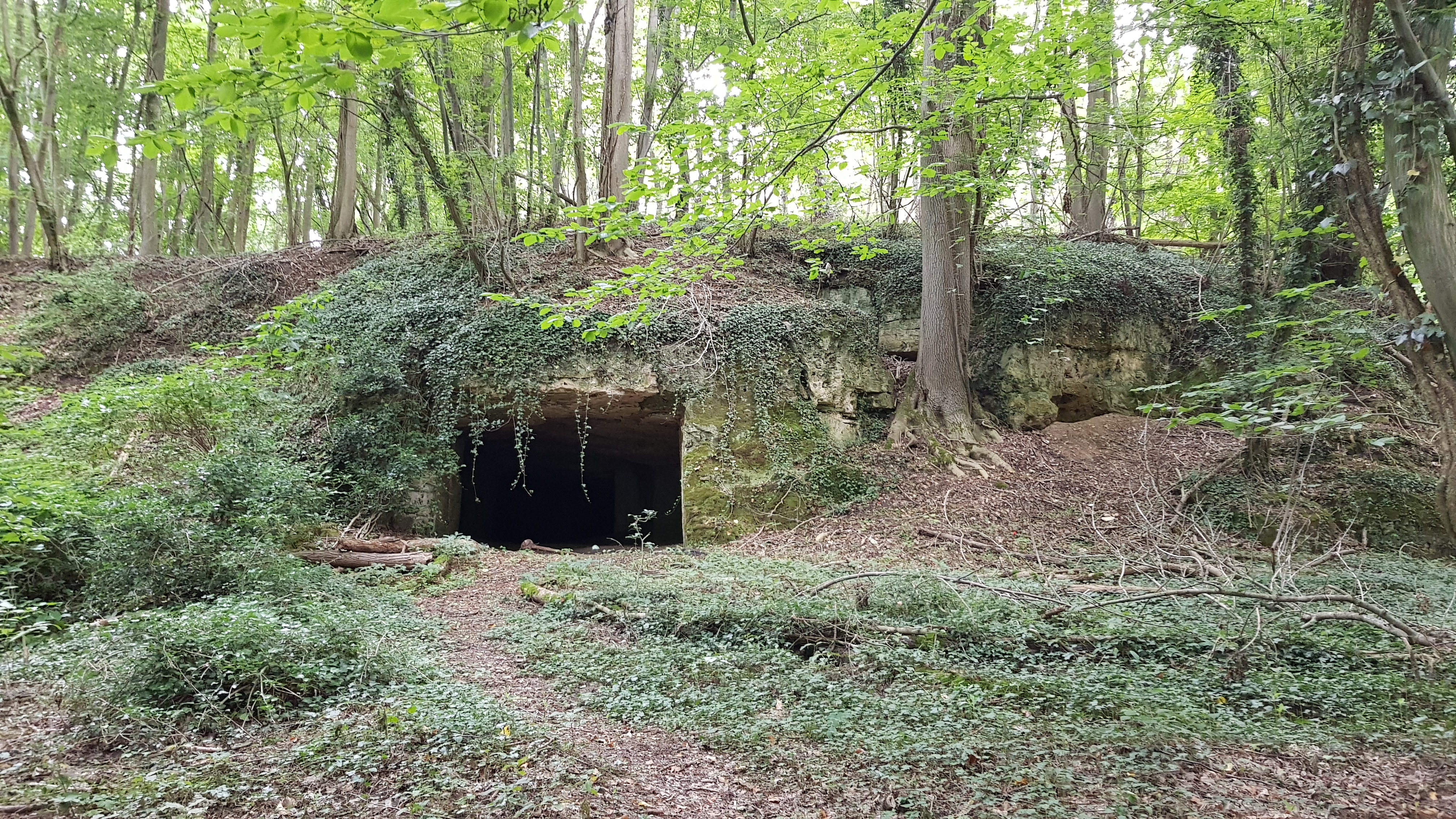 Lebensboschgroeve in het Savelsbos, Rijckholt, Nederland